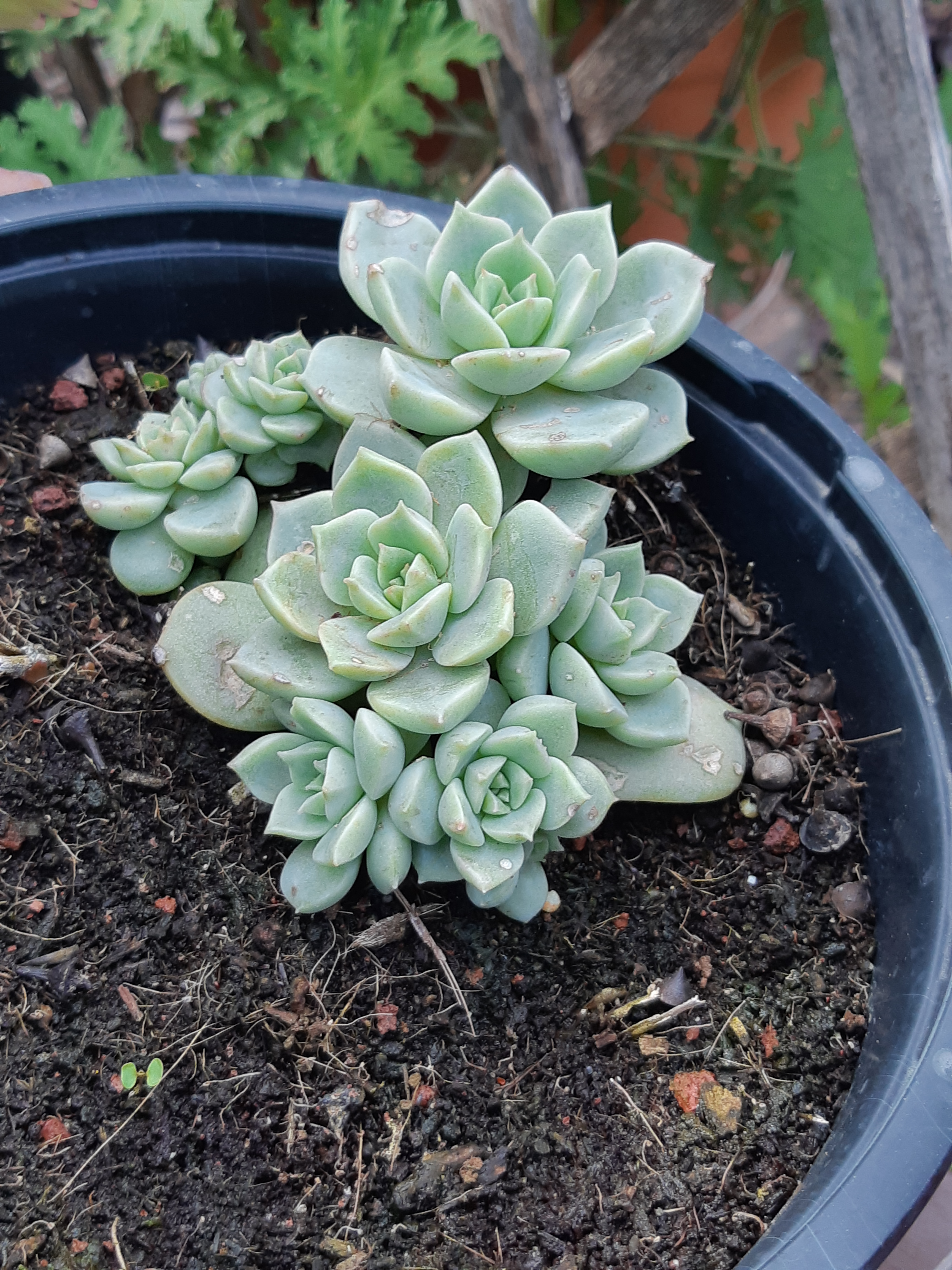 דוגמה לסוקולנט בשרני וגאומטרי